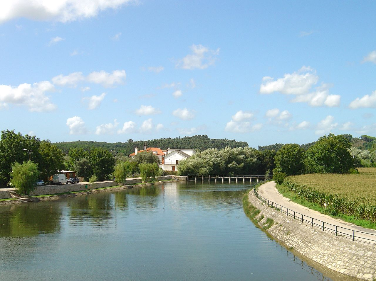 Barragem de Soure - Portugal